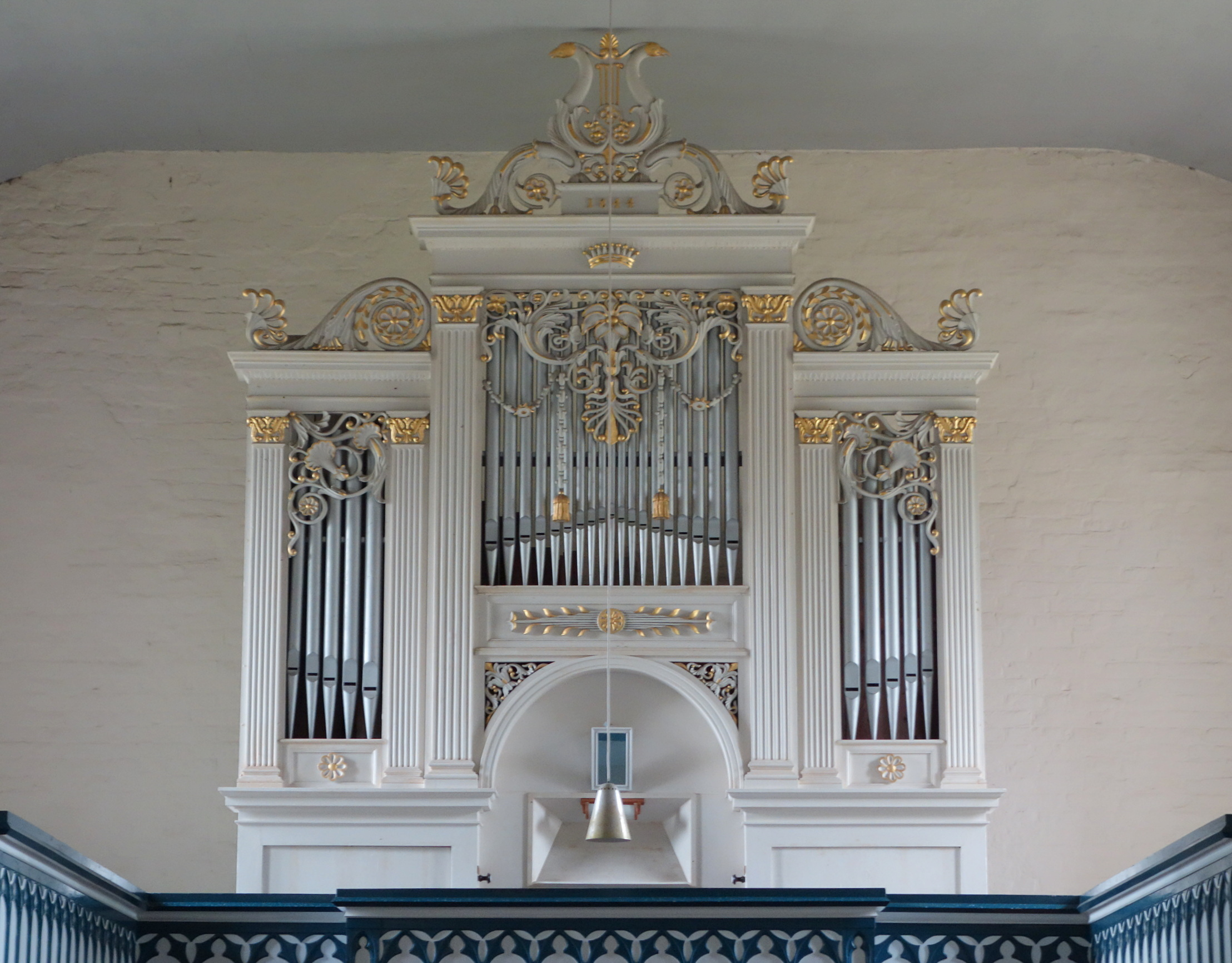 Orgel in Damshagen/St. Thomas, Mecklenburg-Vorpommern, Deutschland